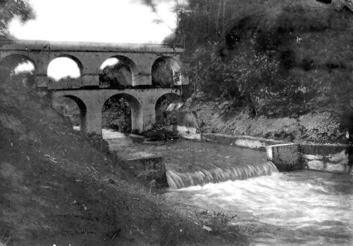 Repronegatief. Aquaduct, Semarang